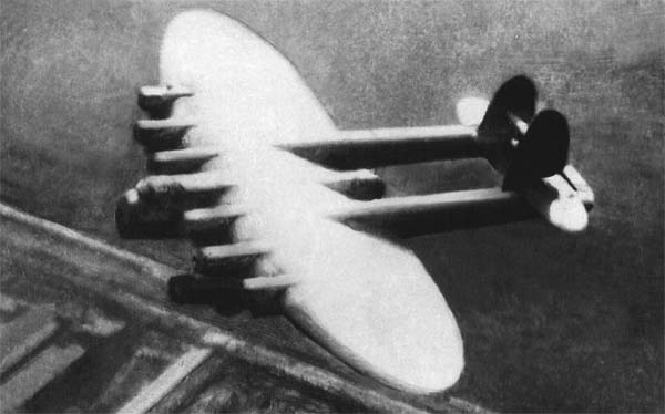 Самолёт-гигант К-7 (Харьков) в полёте Категория:Изображения:Авиация